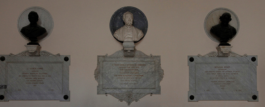 Ca' Foscari, Großer Saal